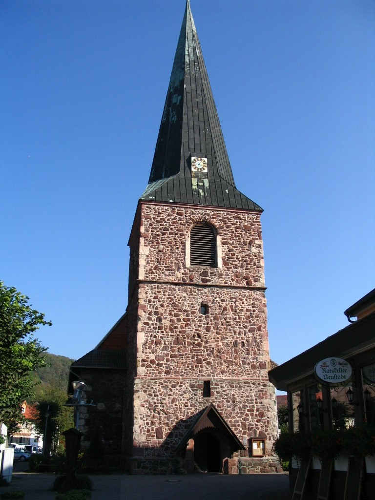 Neustädter Kirche St.Georg